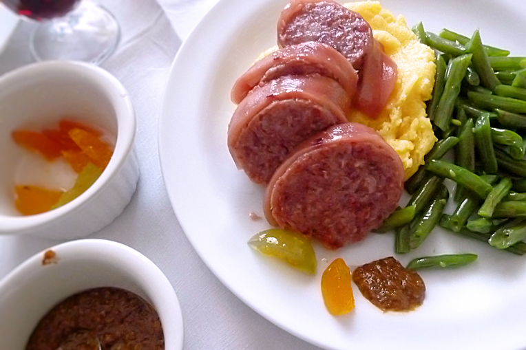 Il Zampone di Modena - Italia.